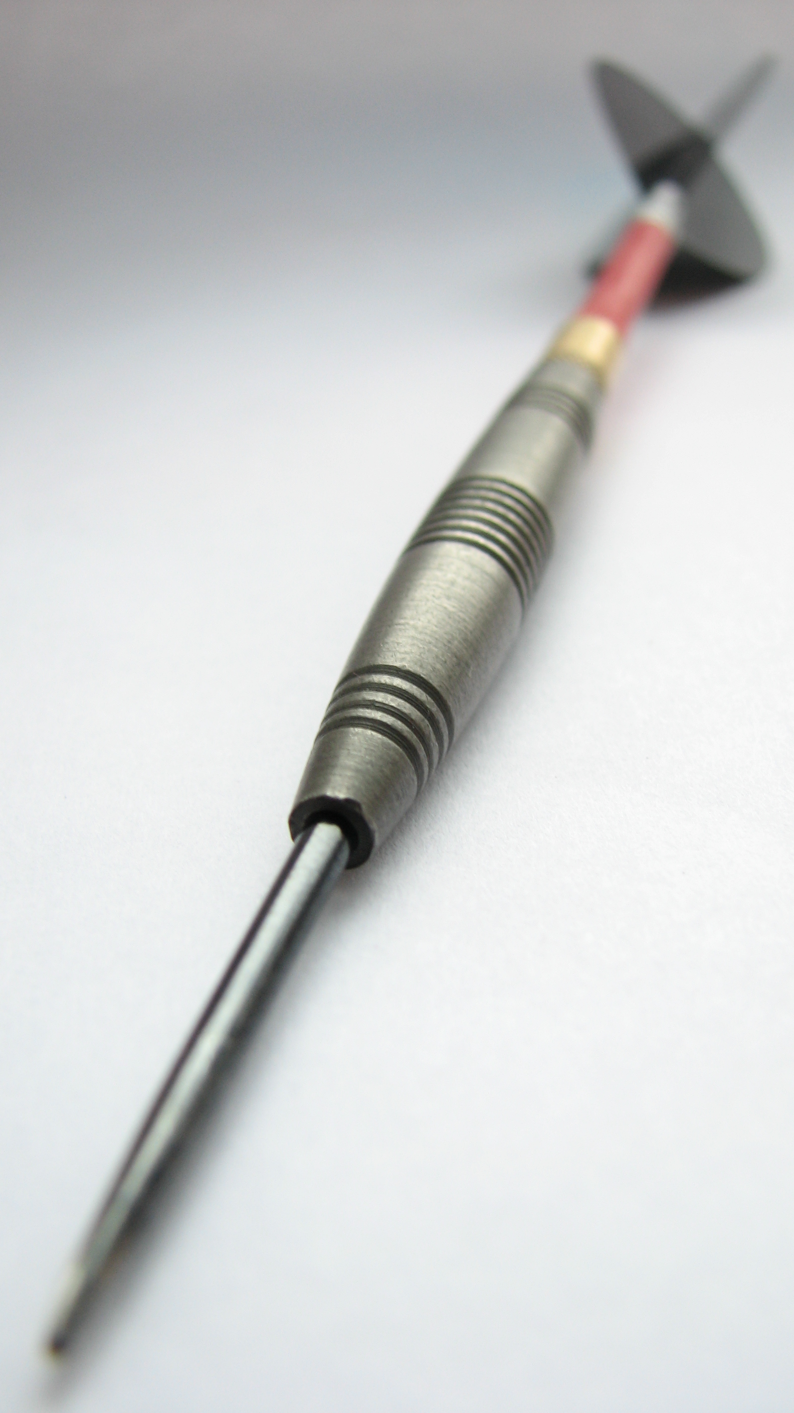 Kilpailussa käytettävä Darts-tikka